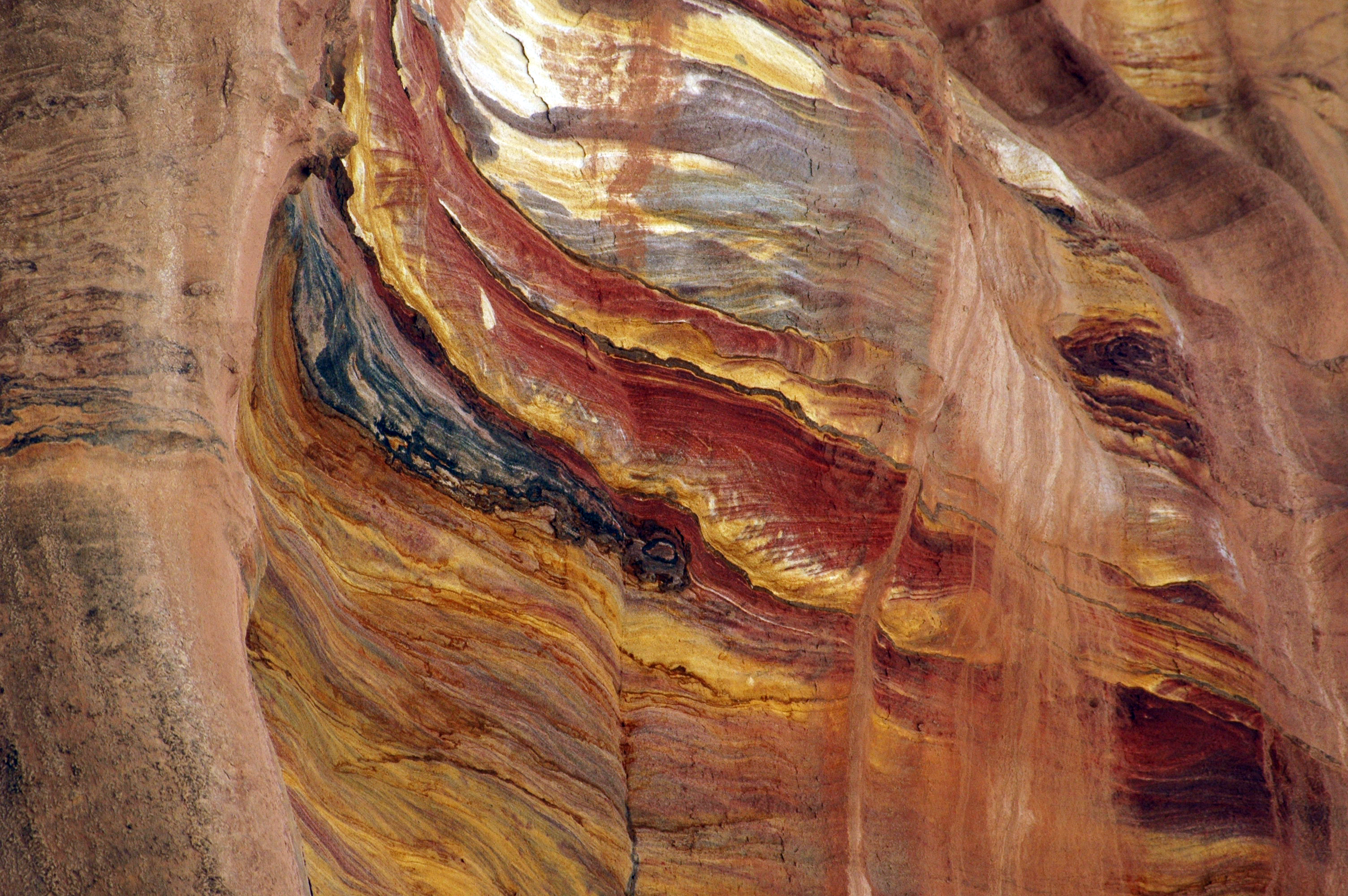 Petra, Jordan